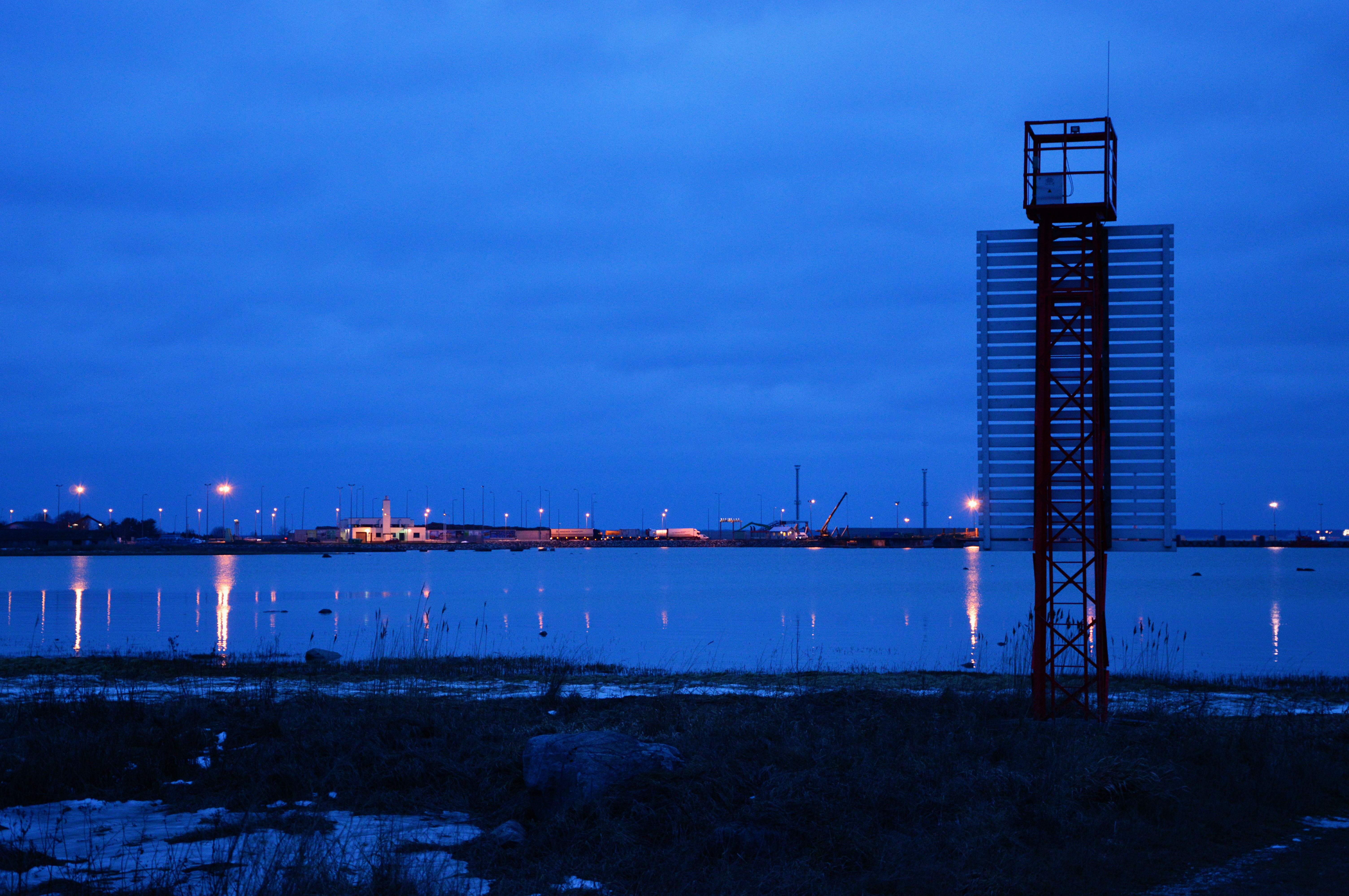 Virtsu liitsihi alumine tulepaak ja Virtsu sadam õhtul.